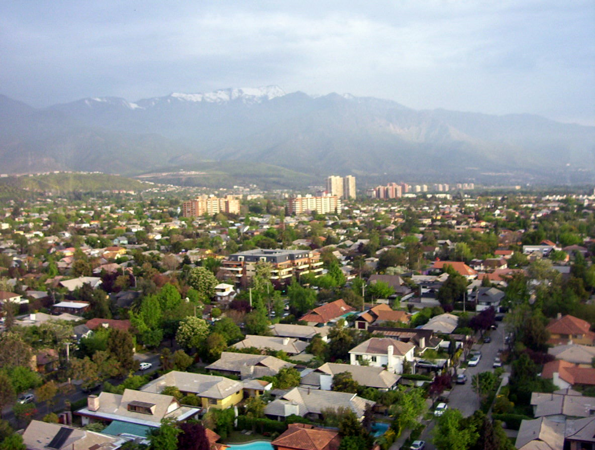 Vista hacia el sureste desde la Avenida Kennedy hacia el Cerro de Ramón, Apoquindo y Quebrada de Ramón .